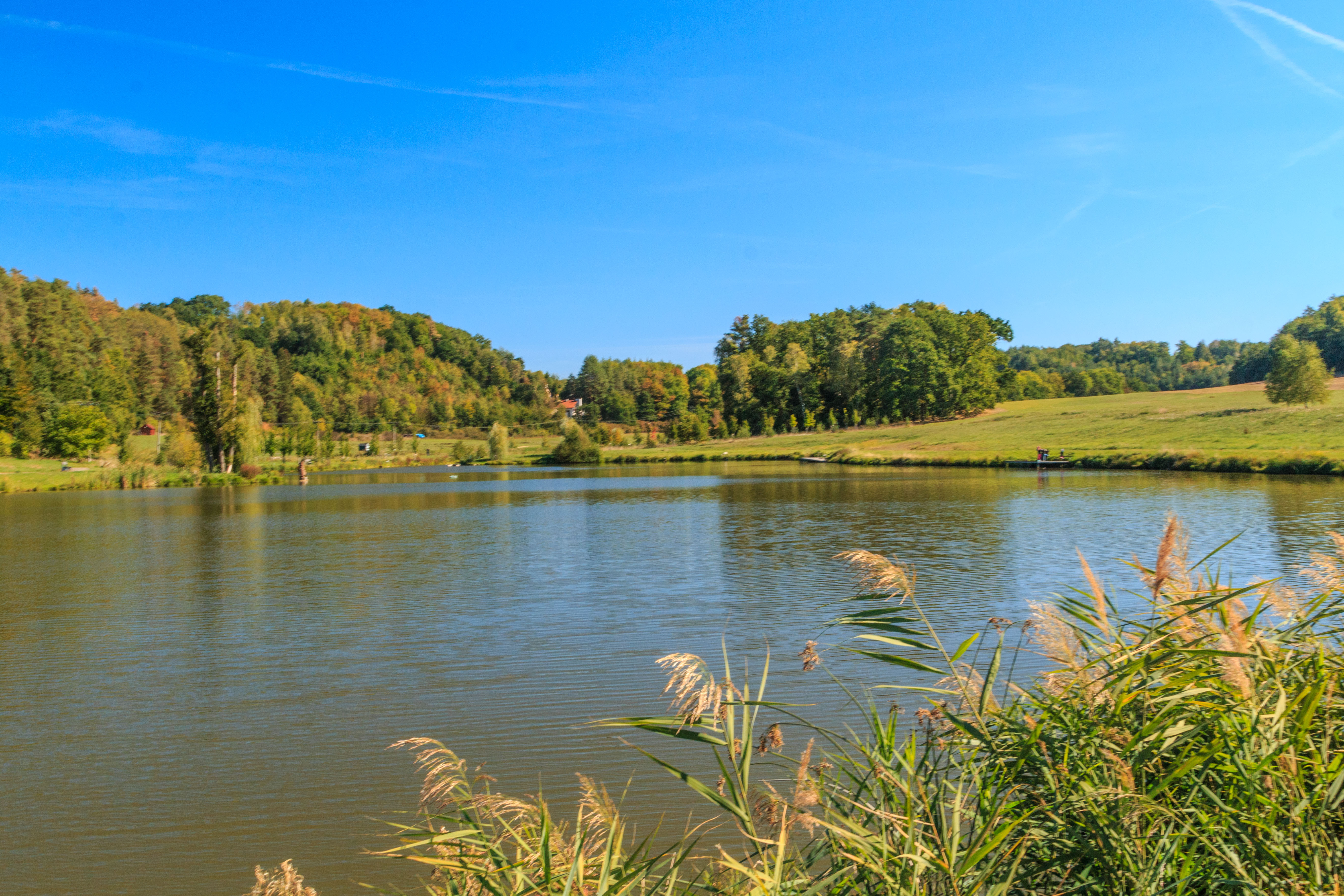 Suhrovické rybníky Project: Vodstvo.